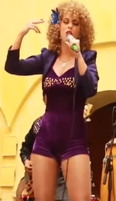 Conoce los Protagonistas "Tarde Lo Conocí" La Historia de Patricia Teherán Nueva Serie de Caracol TV